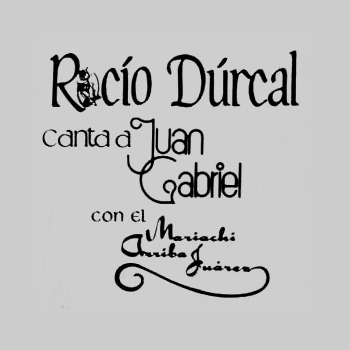 Título del álbum de Rocío Dúrcal 'Canta a Juan Gabriel Vol 6' Esta imagen NO es carátula original y NO es Logotipo original. (Sólo es creación Casera).